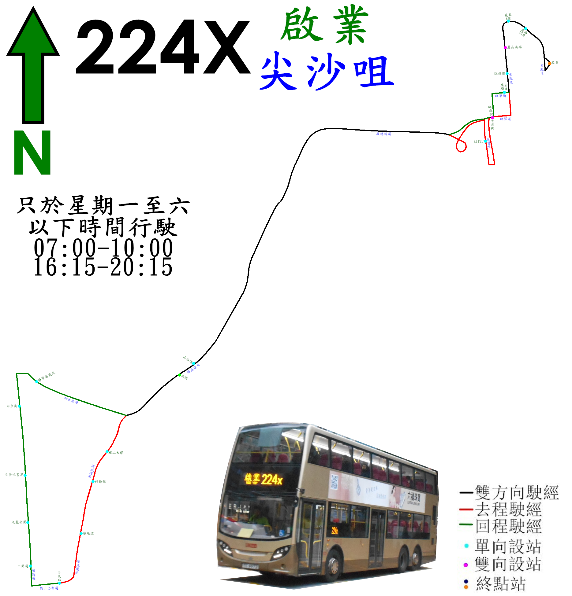 中文（香港）: 九巴224X線的走線圖